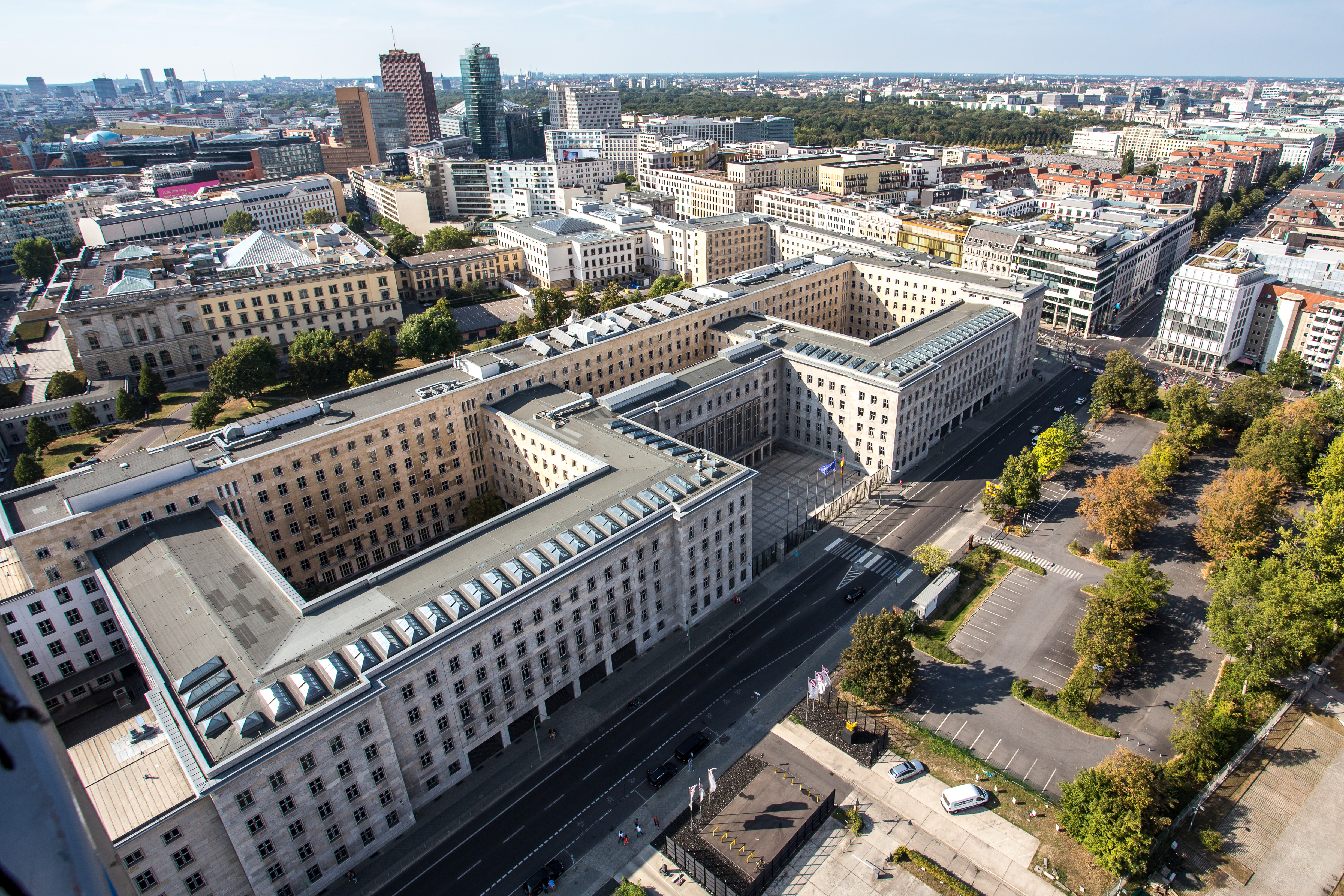 Sitz des Bundesministeriums der Finanzen, LuftaufnahmeThis is a photograph of an architectural monument.